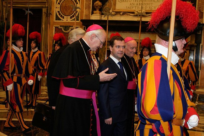 Посещение Ватикана. С префектом Папского двора архиепископом Джеймсом Майклом Харви.